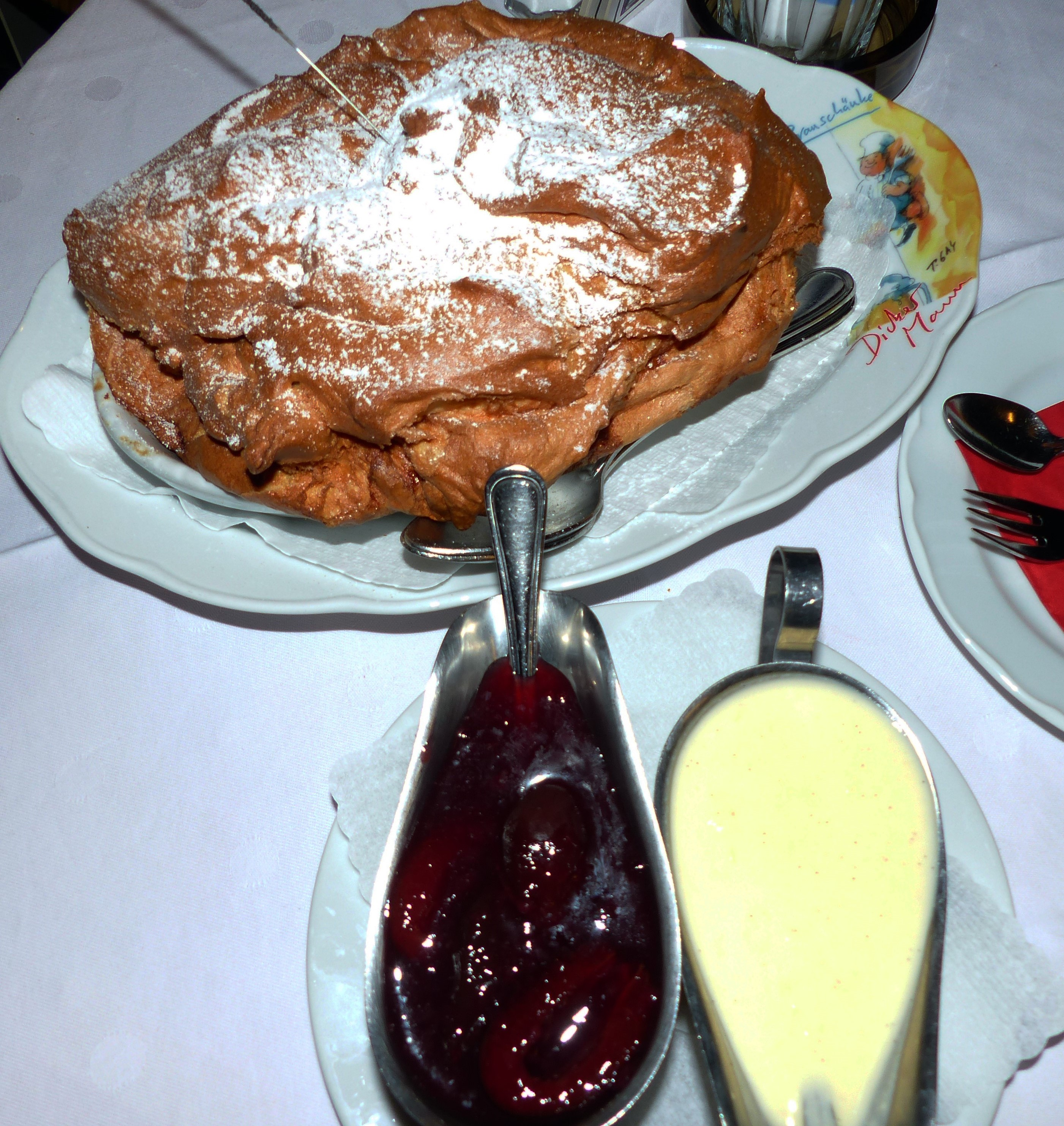 Salzburger Nockerln mit Pflaumen und Vanille-Sosse, Regensburg, Restaurant Dicker Mann/Hotel Zum Blauen Krebs